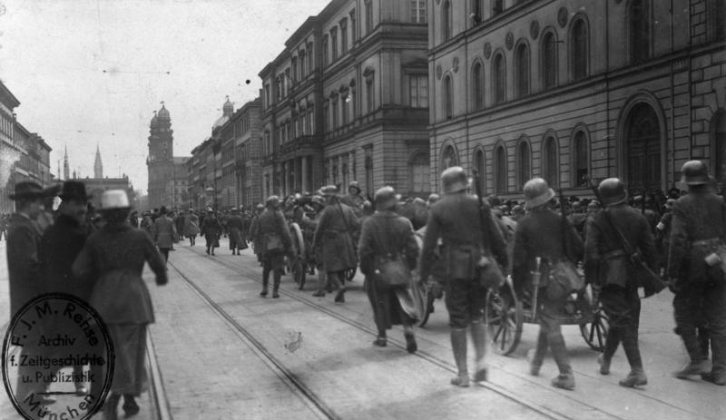 Einzug der Gardeschützendivision unter dem Jubel der Bevölkerung. Befreiung Münchens